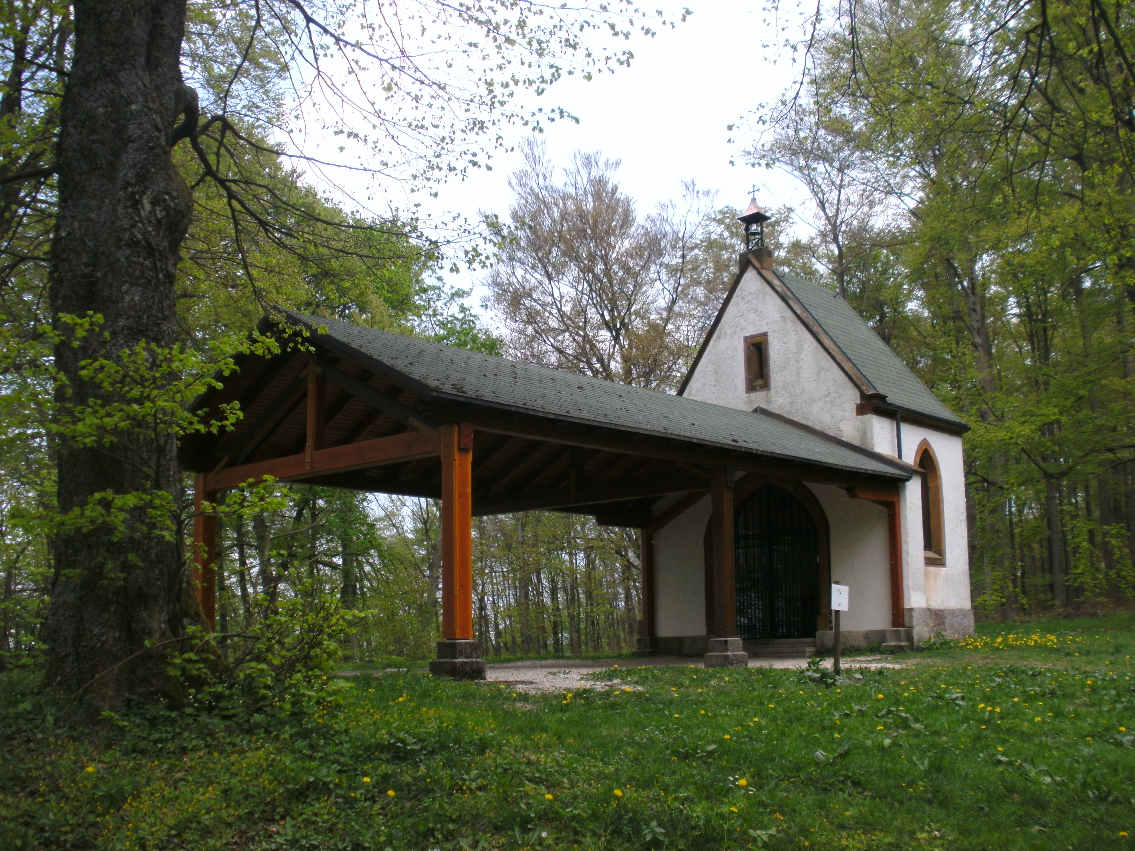 Wallfahrtskapelle St. Bernhardus auf dem 778 m hohen Bernhardus bei Schwäbisch Gmünd. Die 1880 erbaute Kapelle steht an gleicher Stelle wie die 1809 abgebrochene barocke Wallfahrtskirche und gehört heute zur Stadt Lauterstein. Ansicht von Westen.